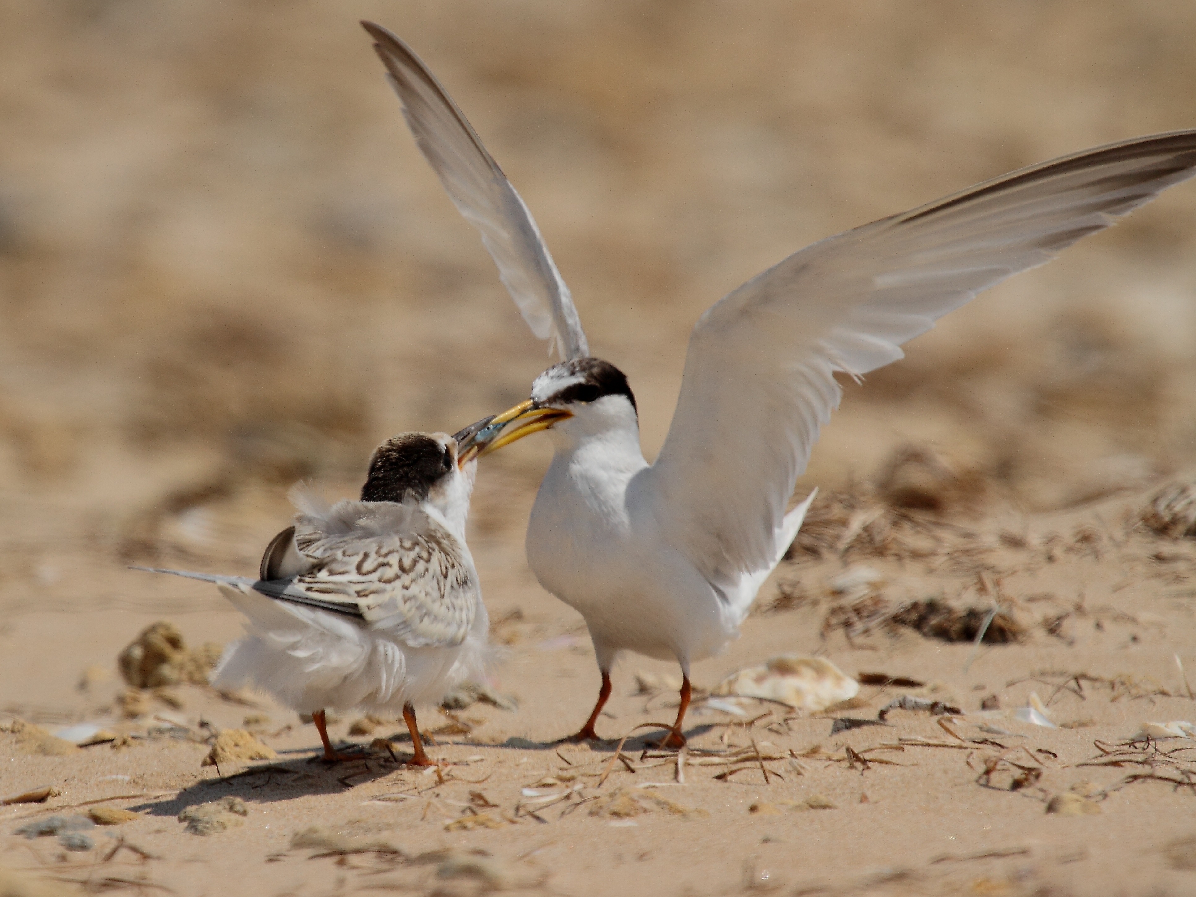 Charrancito Sternula albifrons, Parque Natural Bahía de Cádiz, España.